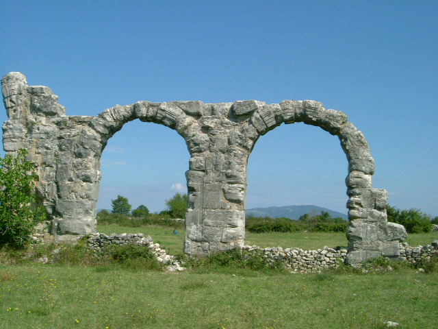 gli archi della basilica di Burnum (Croazia)